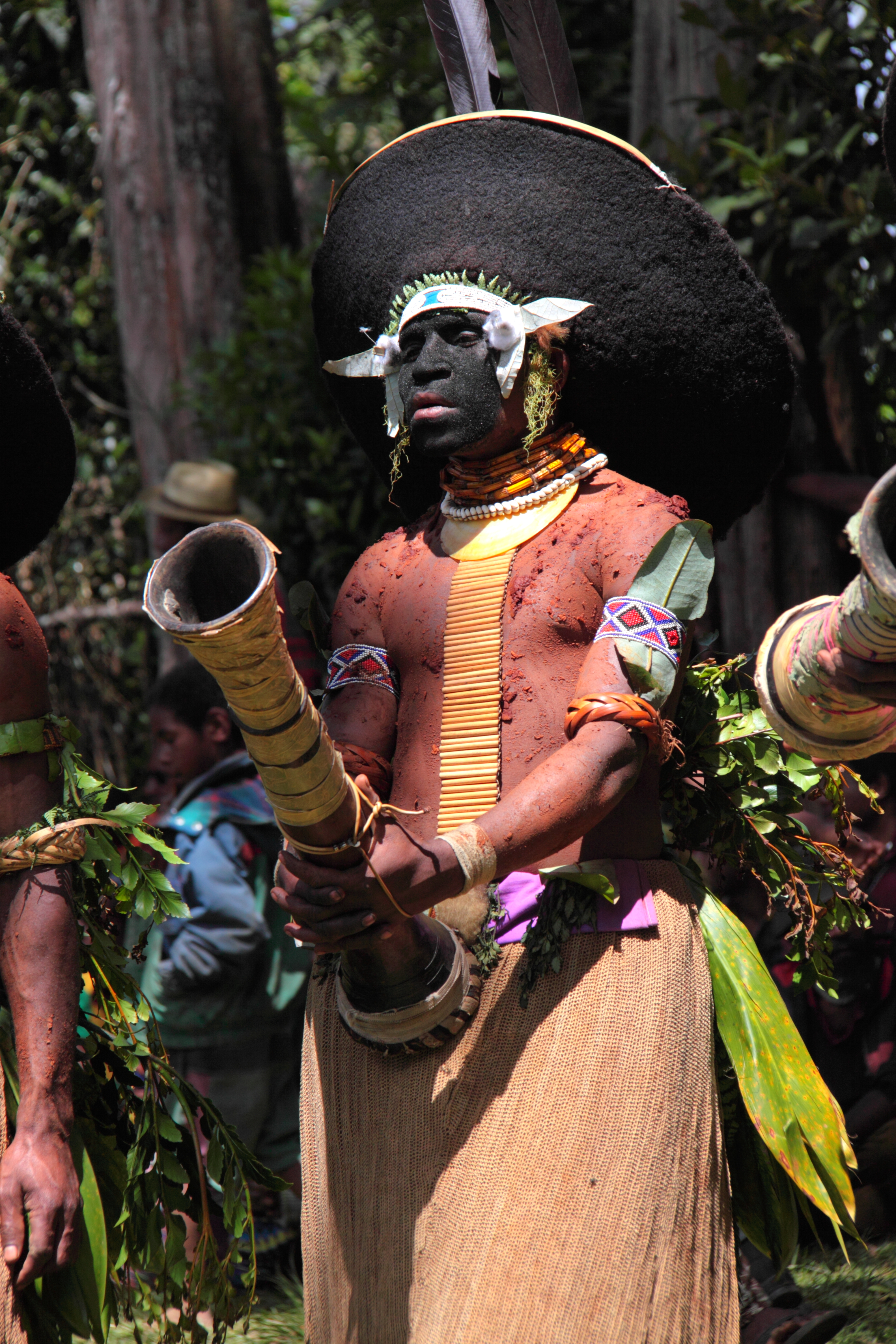 papouasie, festival de mount hagen, silimoulee